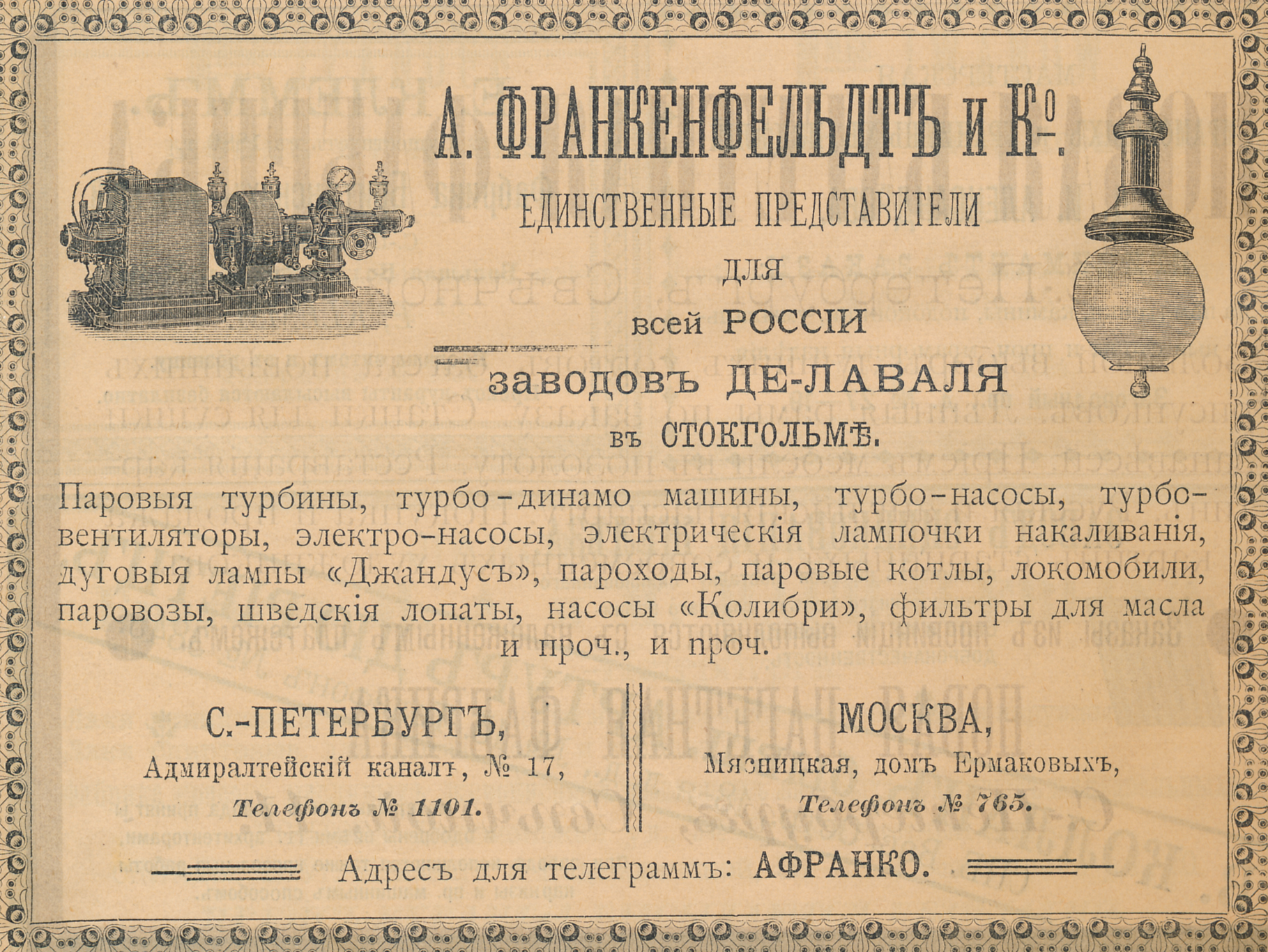 Реклама продукции заводов де Лаваля, 1899 год.